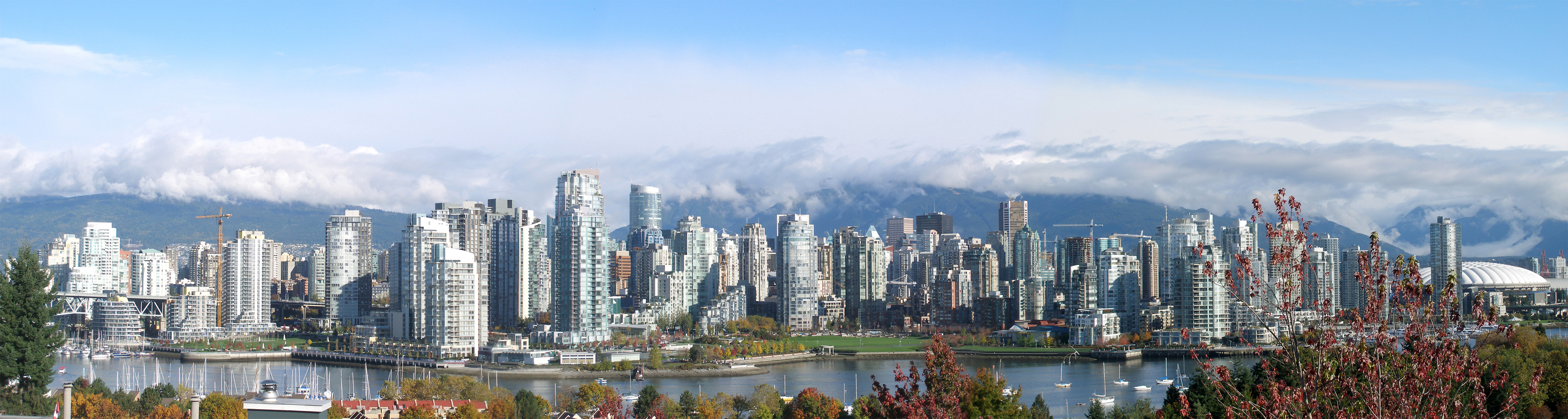 Vancouver Horizon